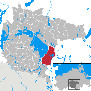 Rechlin in Mecklenburg-Western Pomerania - District Müritz